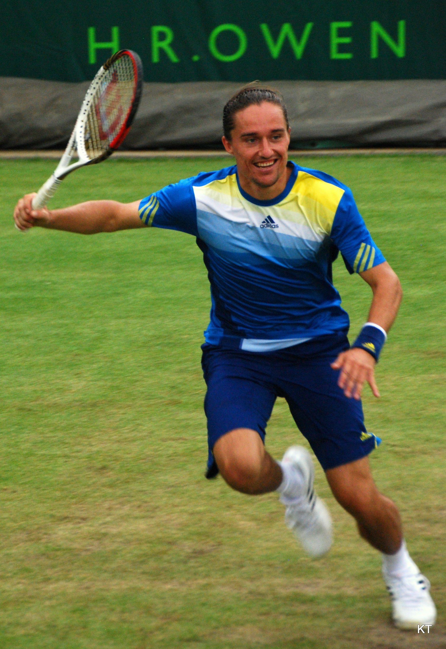 Alexandr Dolgopolov